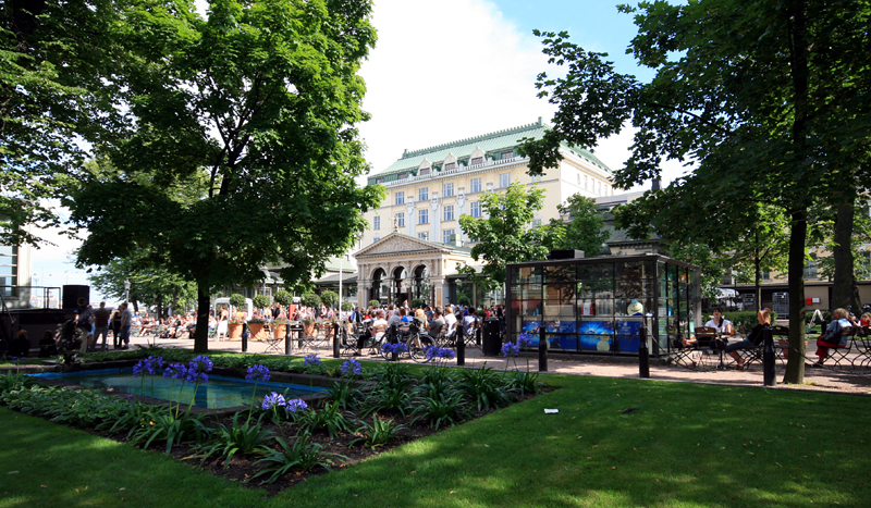 Kappeliesplanadi, Helsinki.